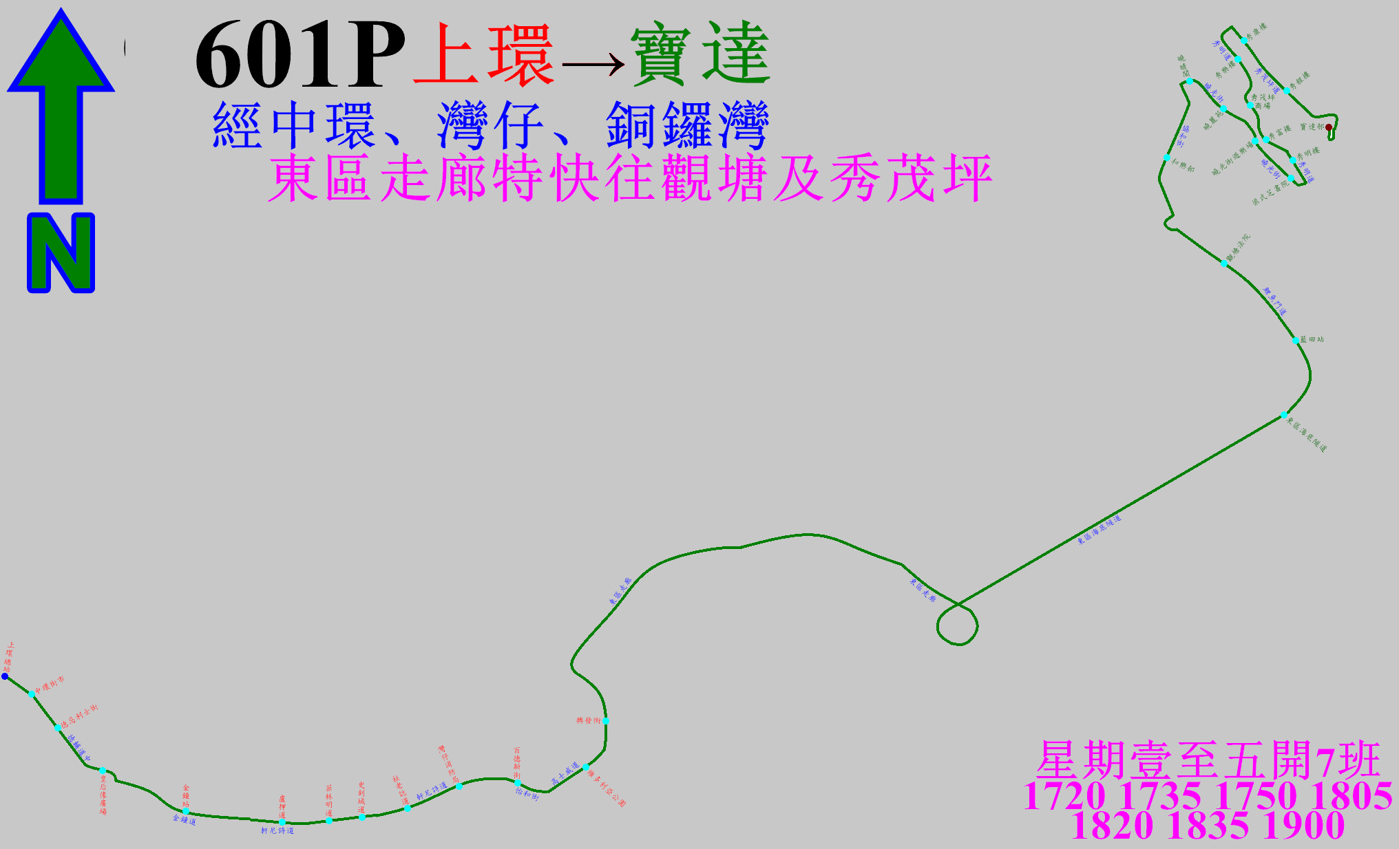 中文（香港）: 過海隧巴601P線九龍方向的走線圖